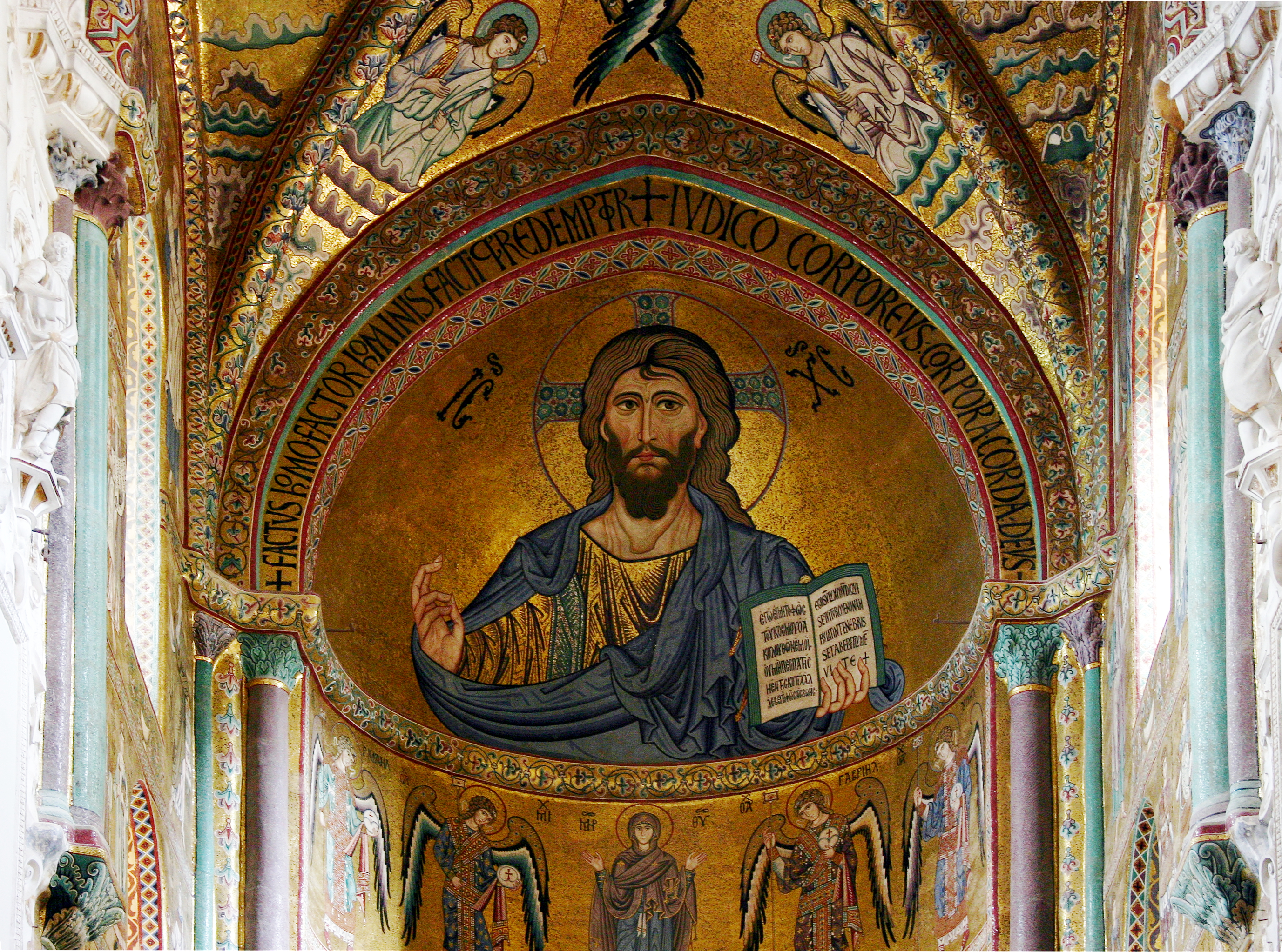 Cathedral of Cefalù